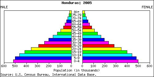 Bildbeschreibung: bevoelkerungspyramide Quelle: Michael82 17:11, 22. Apr 2006 (CEST) Fotograf/Zeichner: Michael82 17:11, 22. Apr 2006 (CEST) Datum: Sonstiges